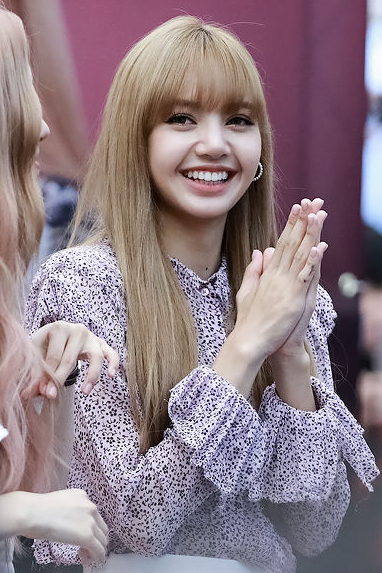 Lisa Manoban em um evento de fansign do Black Pink no Live Plaza da COEX em Seul, em 19 de agosto de 2018